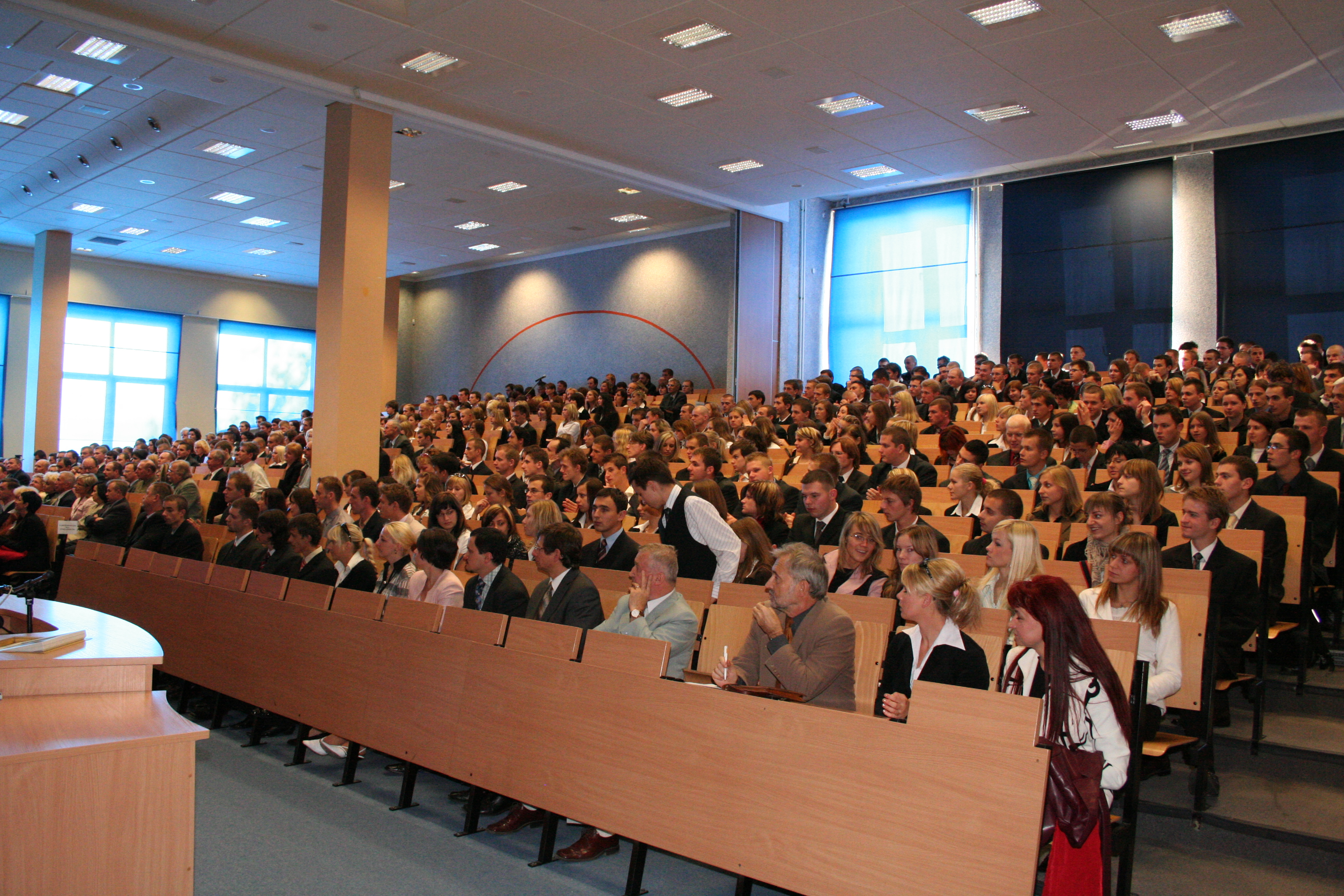 WSPA Lublin - aula